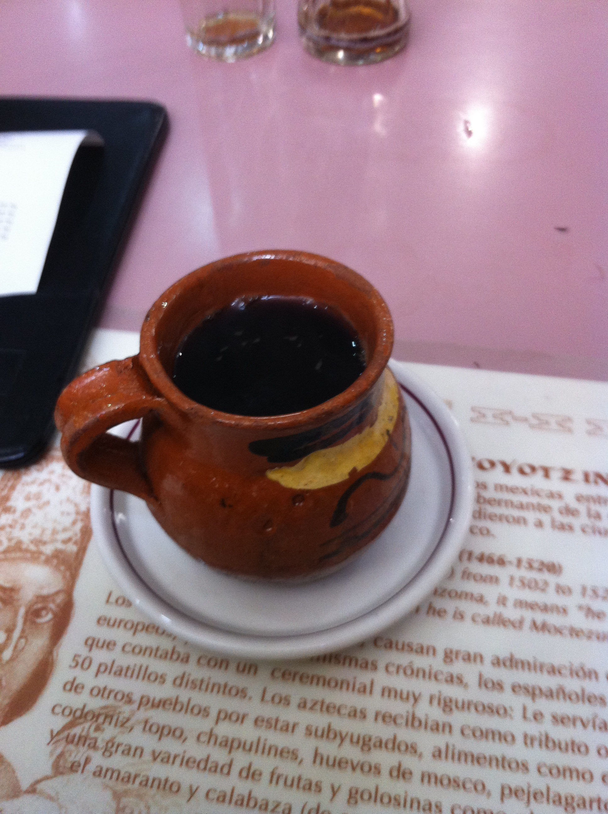 Café de olla - Restaurante Don Chon, Mexico